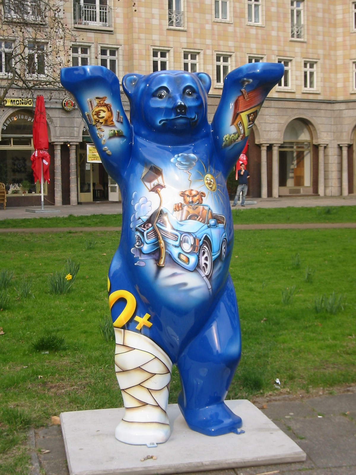 Buddy Bear: Hoffentlich ...... Standort/Location: Strausberger Platz, Berlin-Friedrichshain